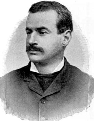 foto dello scacchista irlandese James Mason (1849-1905)